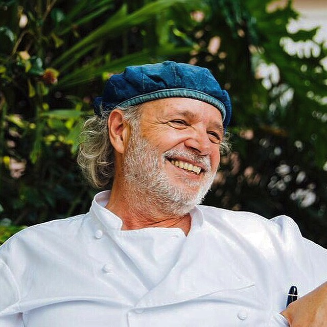 Francis Mallmann, 2016